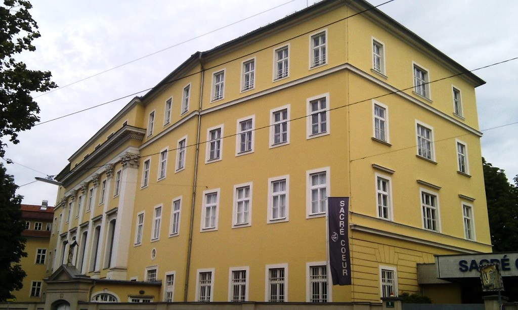 Schule und Kloster Sacré Coeur, Petersgasse 1, Graz